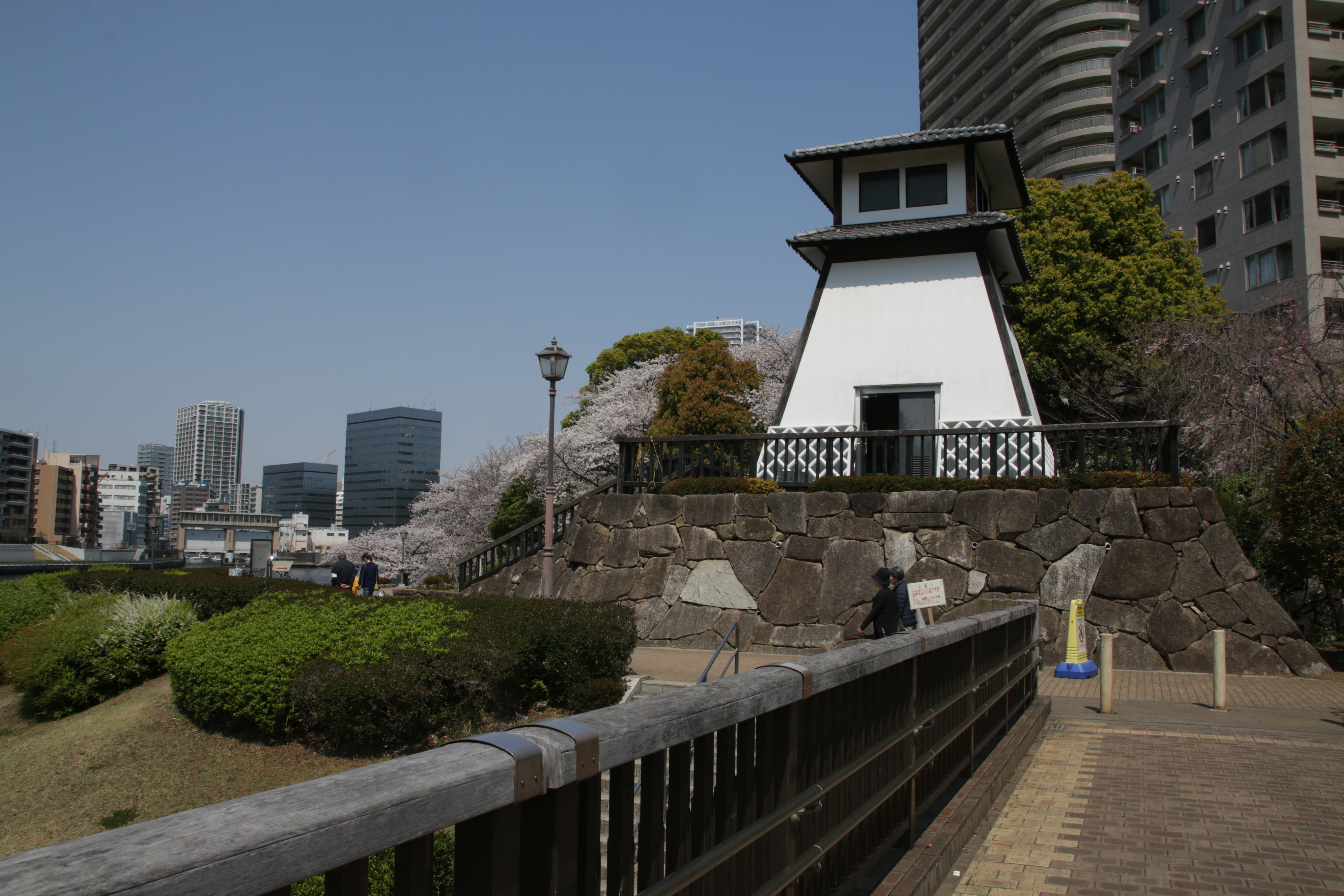 佃島公園内に設置されている復元された石川島灯台。石垣部分の内部は公衆便所となっている。2019-04-06撮影